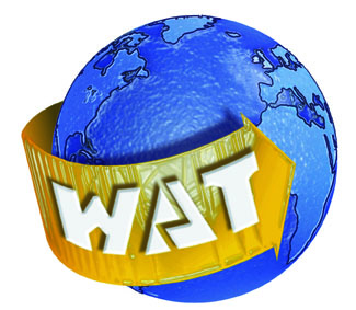 Logo du bouquet satellite WAT tv lancé en 1997.